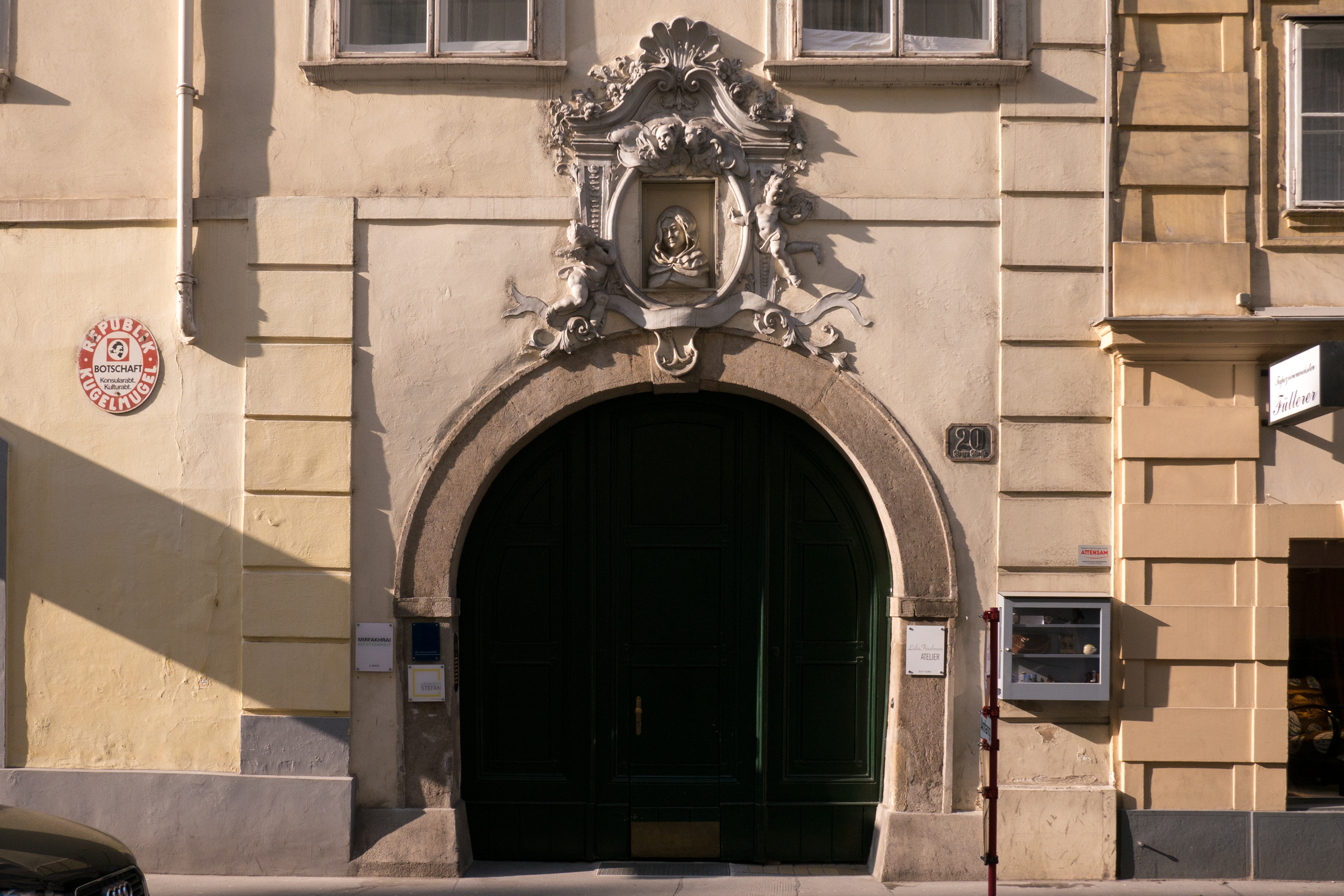 Bürgerhaus